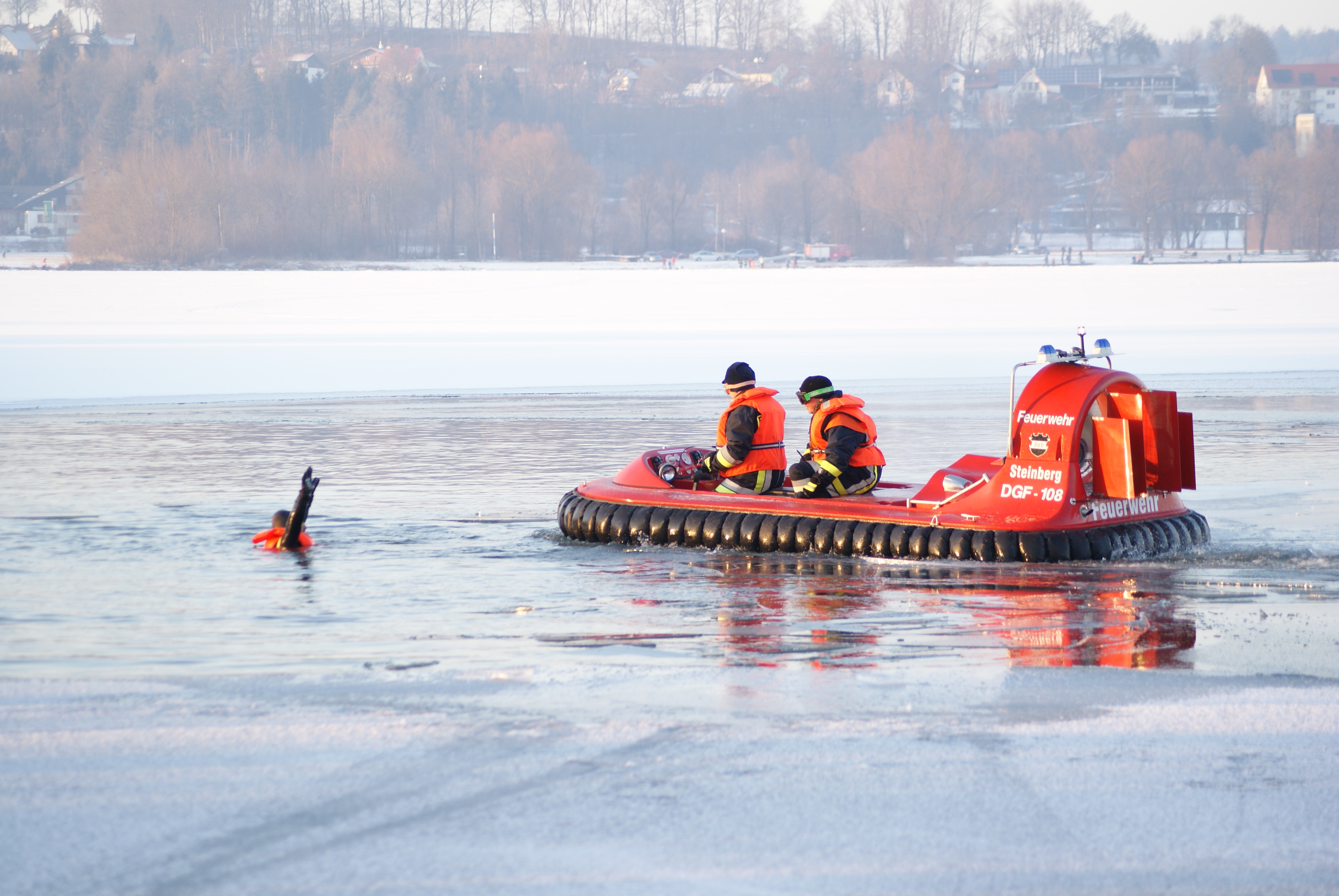 Hovercraft der Feuerwehr Steinberg. Erstes Hovercraft einer Freiwilligen Feuerwehr in Bayern. Eingesetzt zur Eisrettung am Vilstalsee bei Steinberg, Marklkofen.